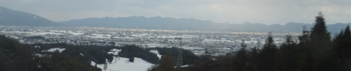 松江市市街地 遠景